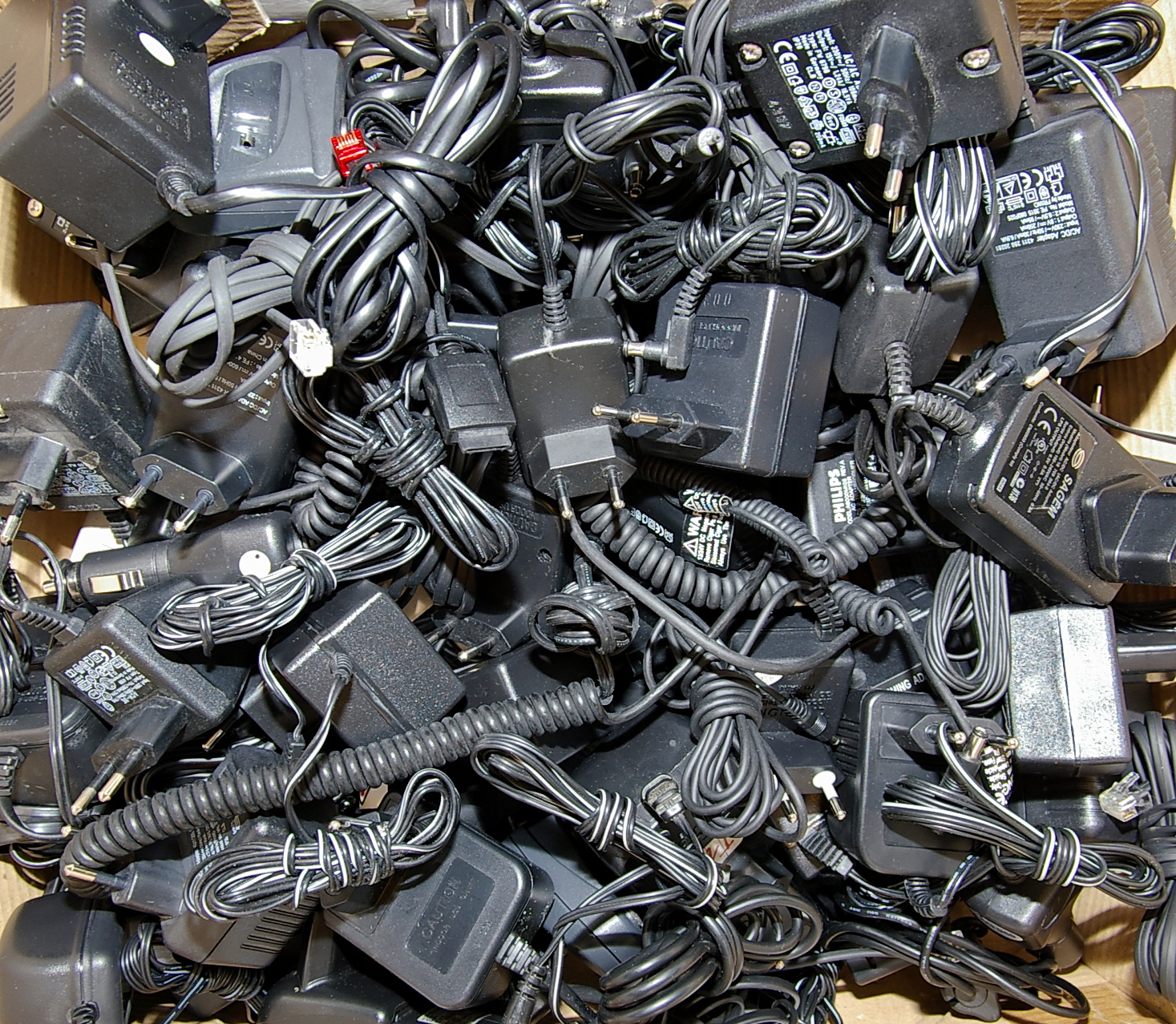 Netzteile/Steckernetzteile ("Wandwarzen") / Wallplug Power Supply Units ("Wall warts")